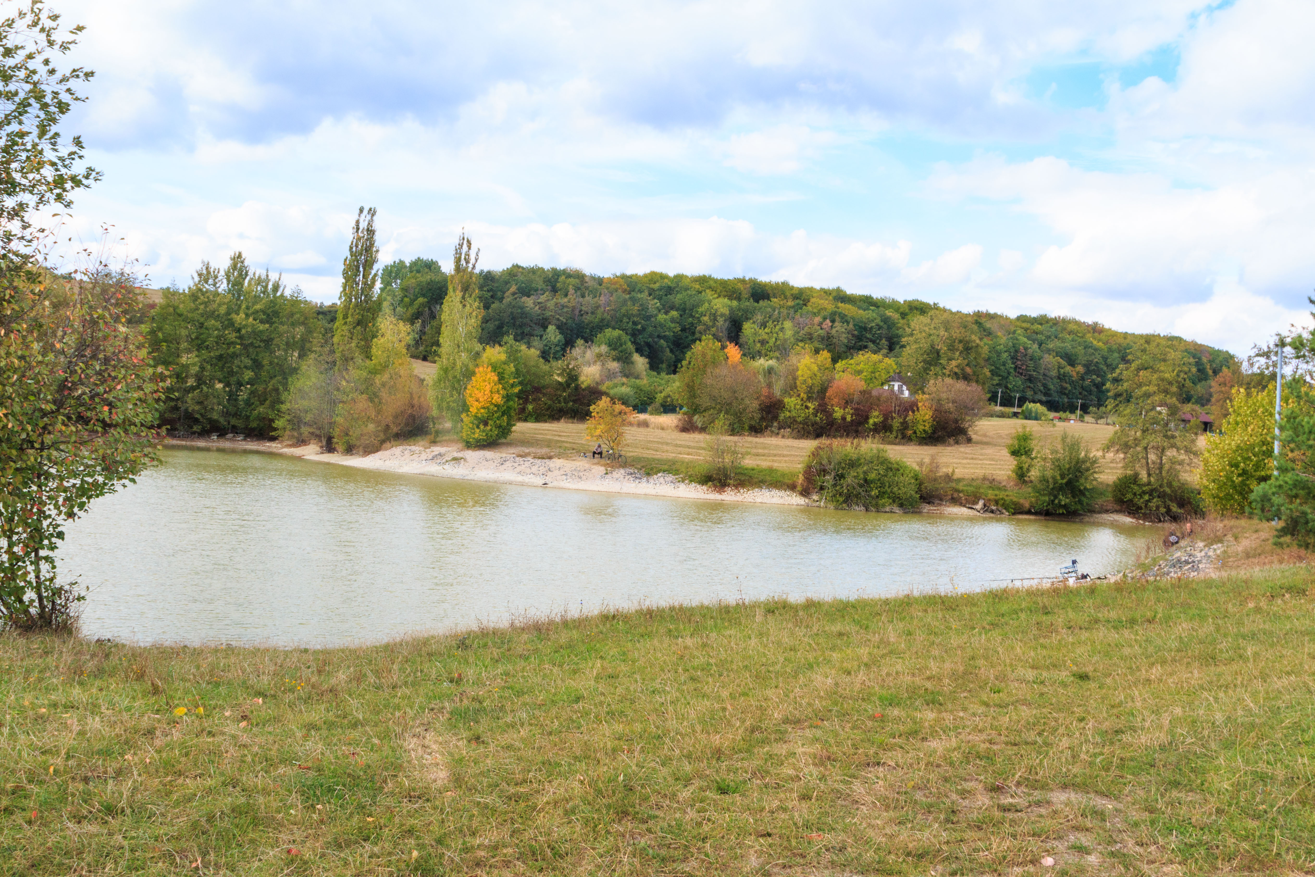 Rybník Blažkovec u Koudelky Project: Vodstvo.